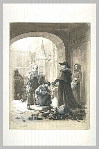 Cardinal d'Ambroise archevêque de Rouen (1460-1510) ; Gravure